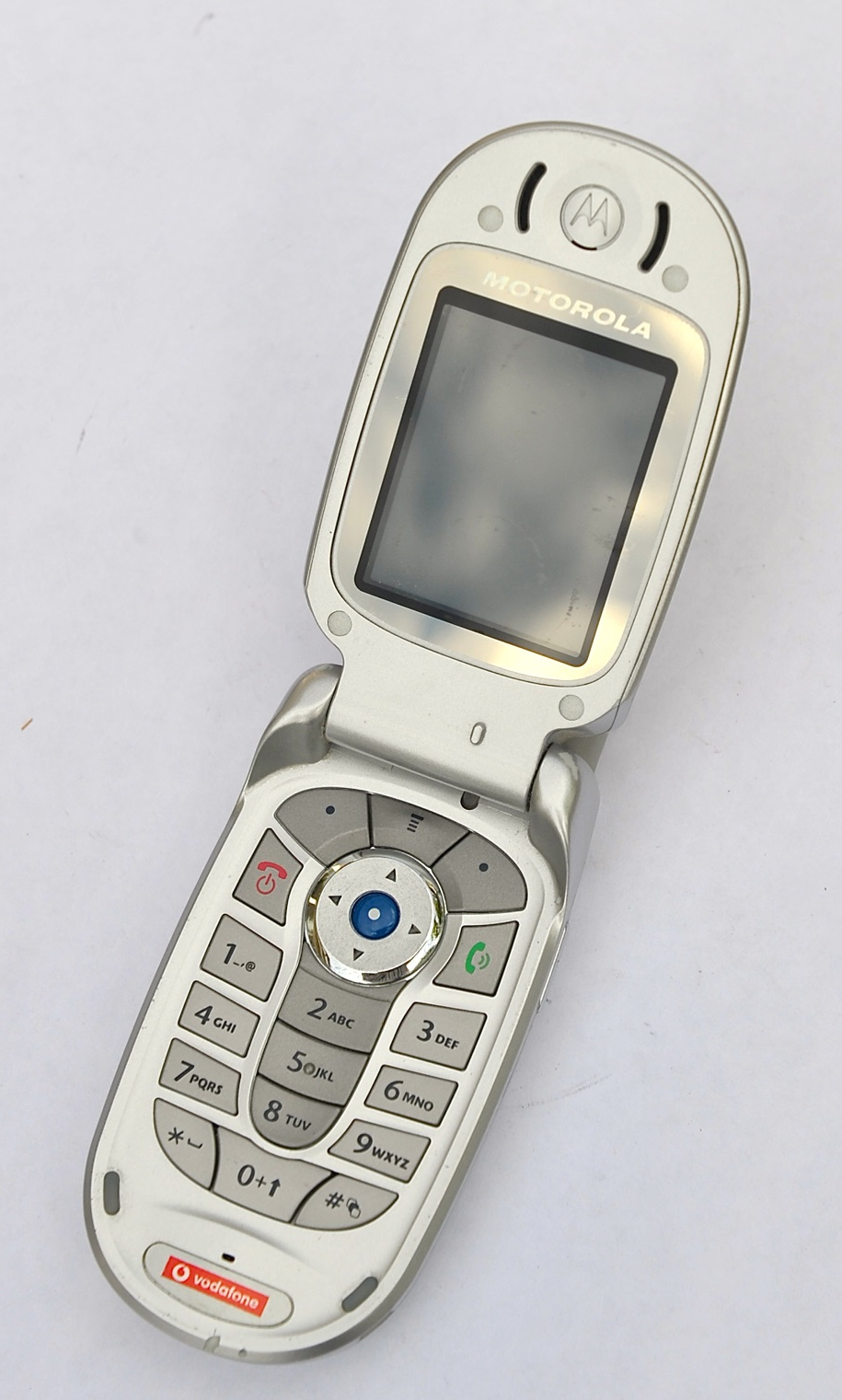 Oorspronkelijk Motorola V535, maar voor Vodafone als V550 in 2004 op de markt gebracht. Kleurenscherm, GPRS en video (640x480).